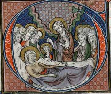 Graduel de Cologne Mort de Marie 225v détail